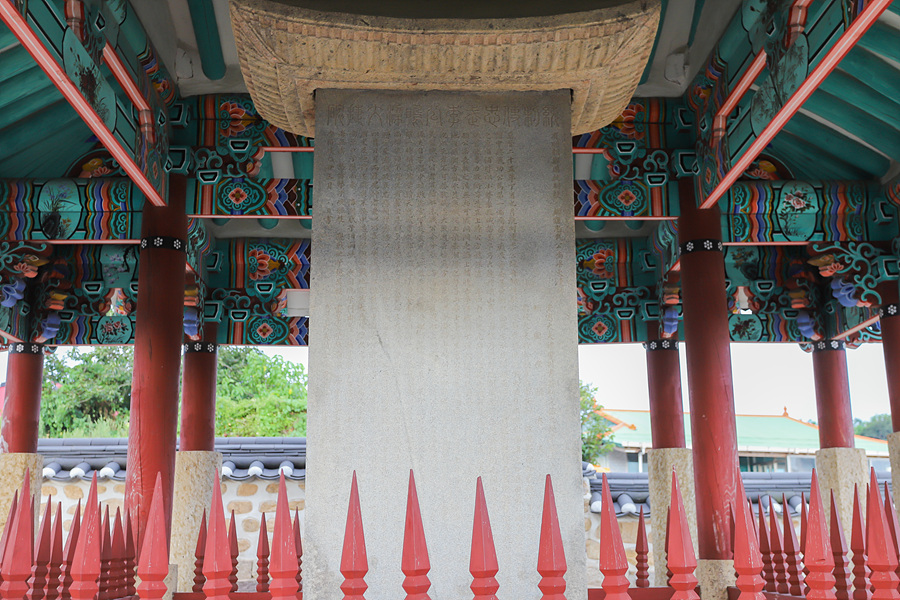 해남명량대첩비